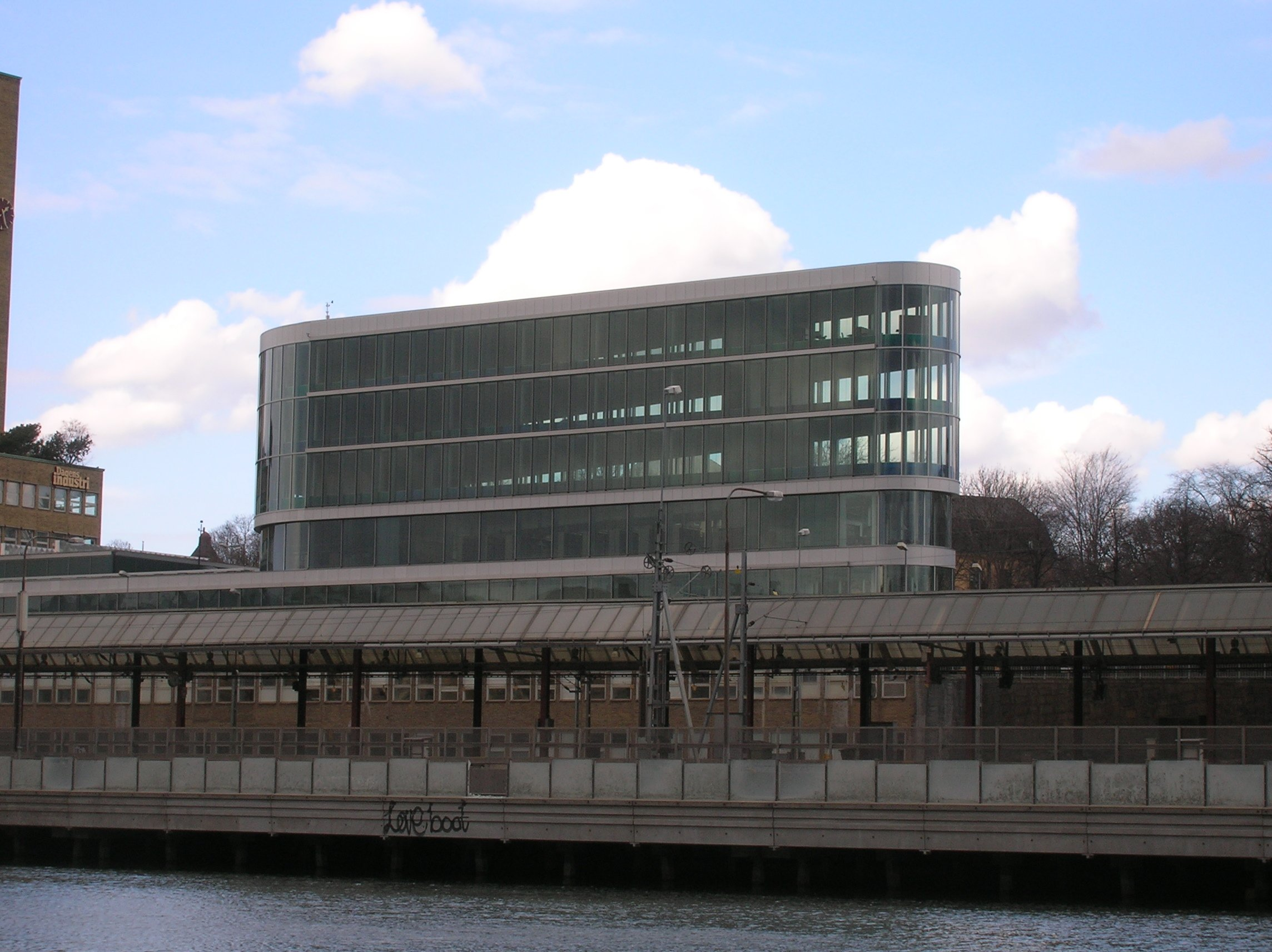 Bonniers konsthall, Stockholm, Stockholm County. Photo taken from Kungsholmen